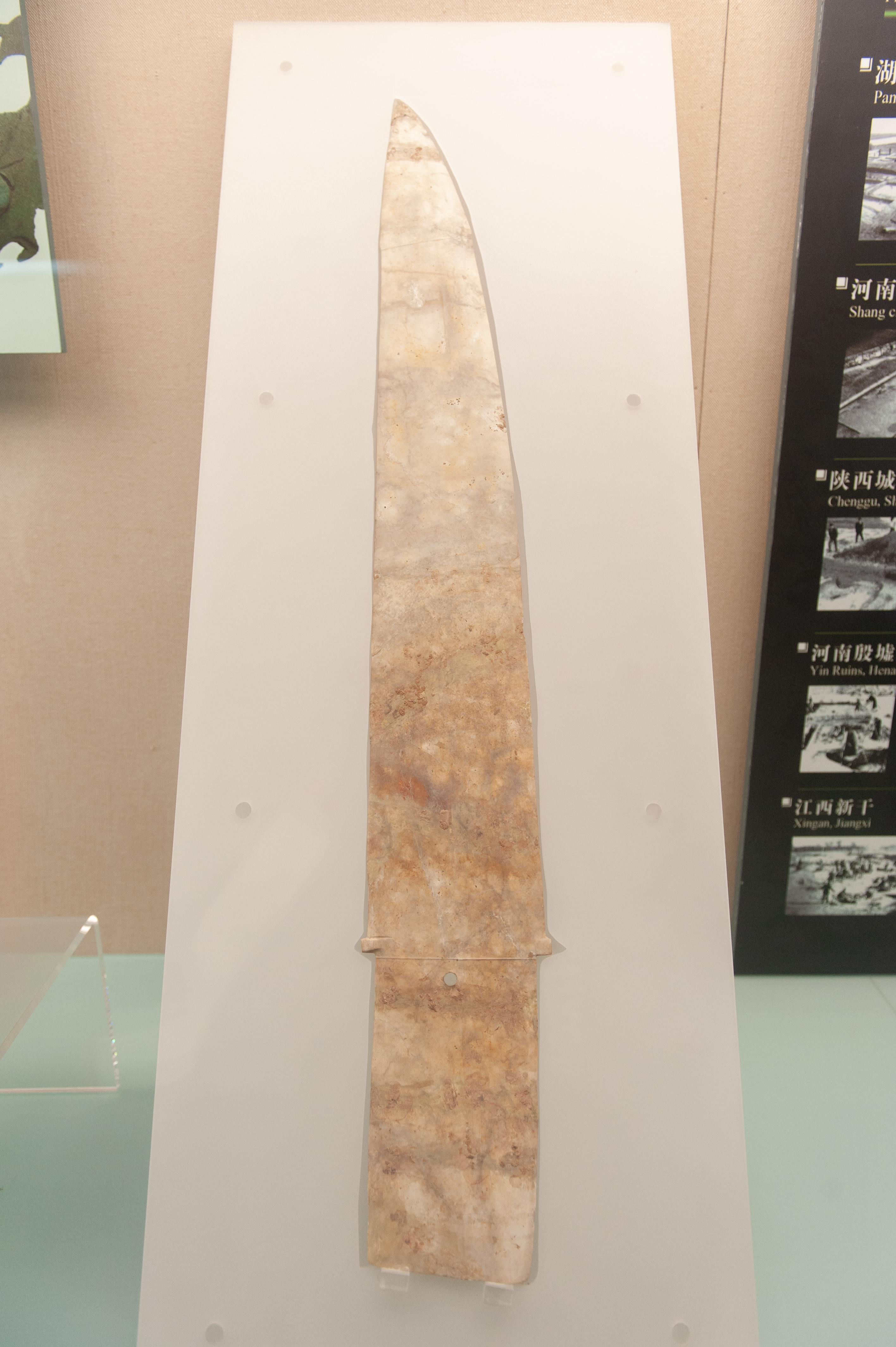 大玉戈，李家嘴3号墓出土，湖北省博物馆藏